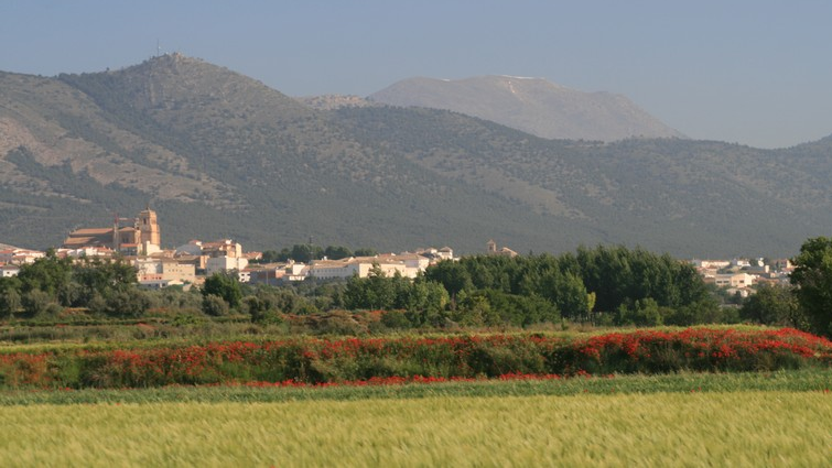 Vista de la localidad de Huéscar, en la provincia de Granada (España).